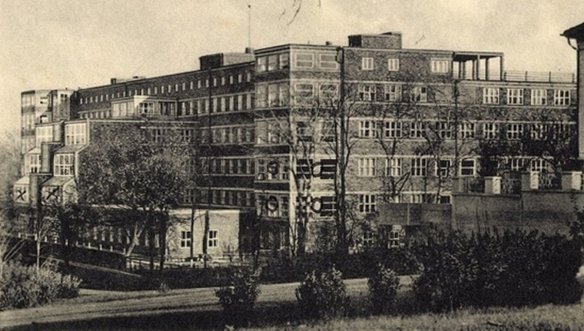 Szpital Landes Frauenklinik (Regionalna Klinika Kobieca), Szczecin 1933